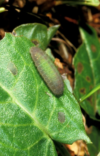 Lycaena tityrus larva